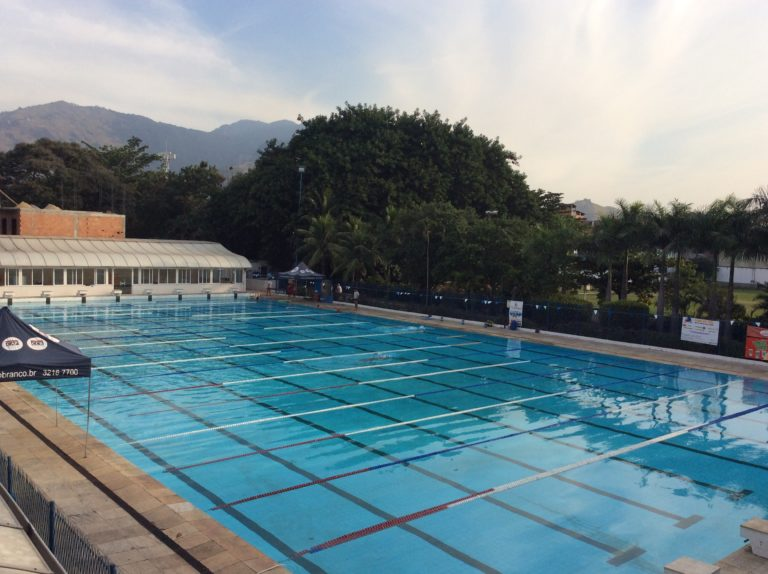 Piscina Olímpica UCB